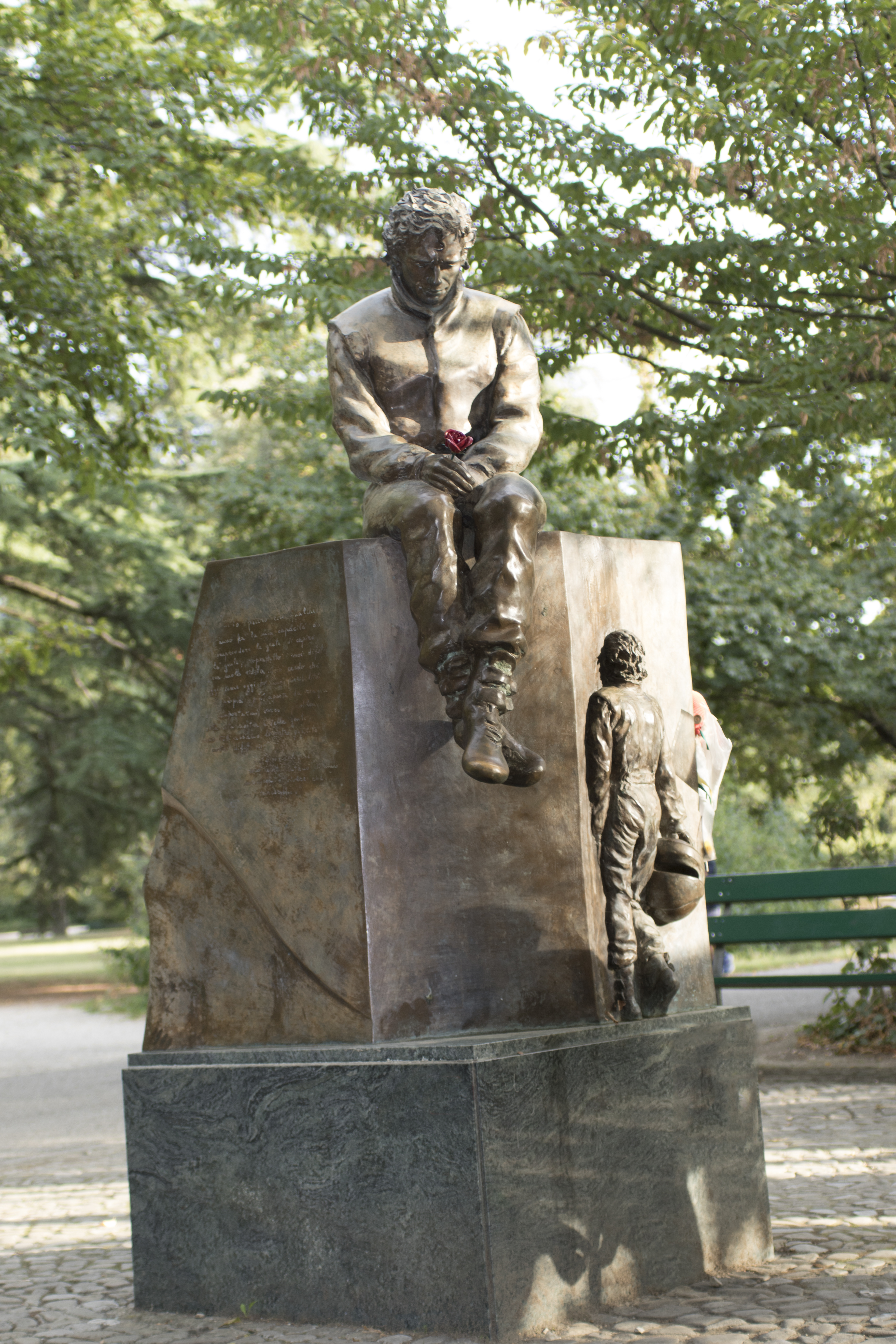 Monumento a Senna This is a photo of a monument which is part of cultural heritage of Italy.